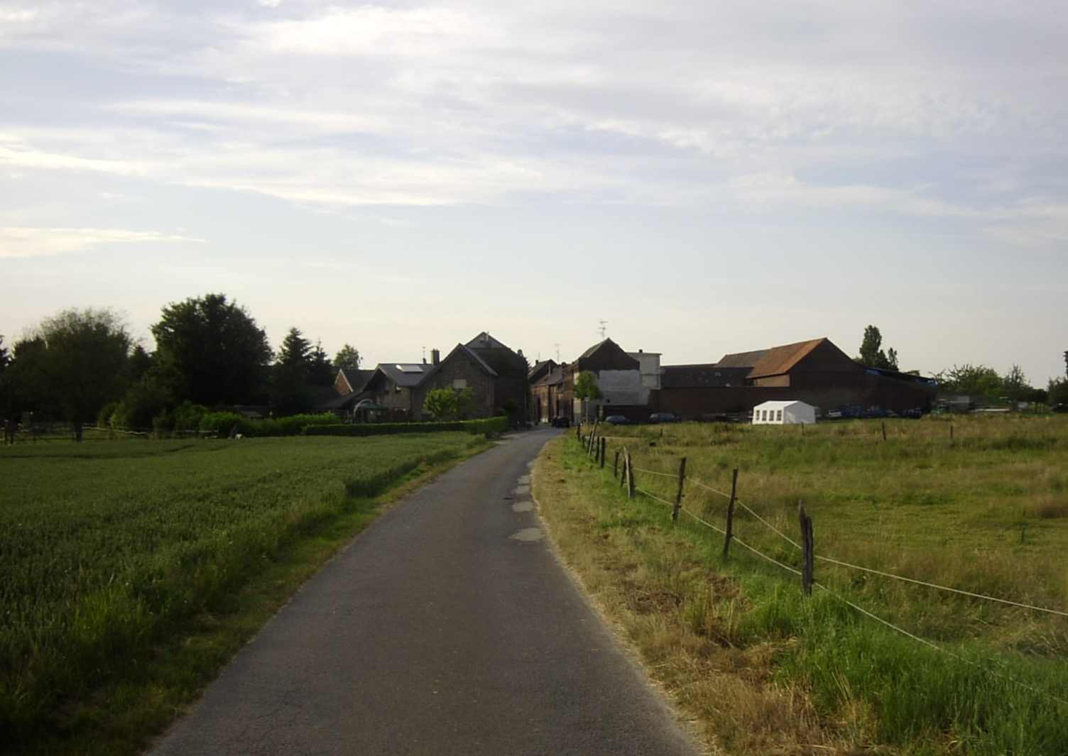 Summary Bildbeschreibung: Beverath Quelle: eigenes Foto Fotograf/Zeichner: bodoklecksel 20:44, 25. Jun 2006 (CEST) Datum: Juni 2006 Sonstiges: ...